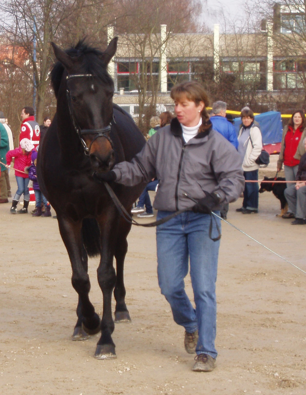 Pferdemarkt Bernhausen, Präsentation einer Stute